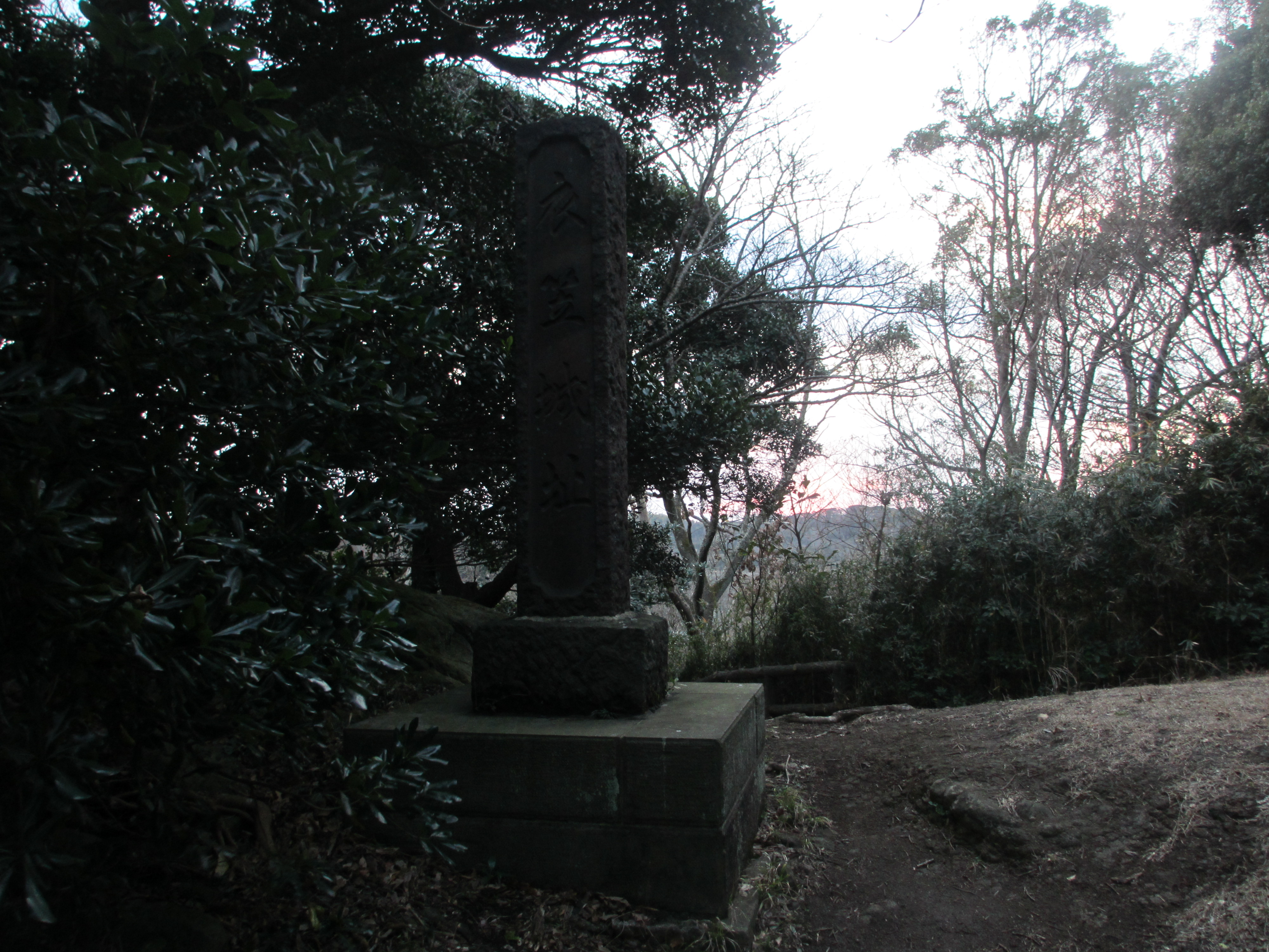 神奈川県横須賀市衣笠